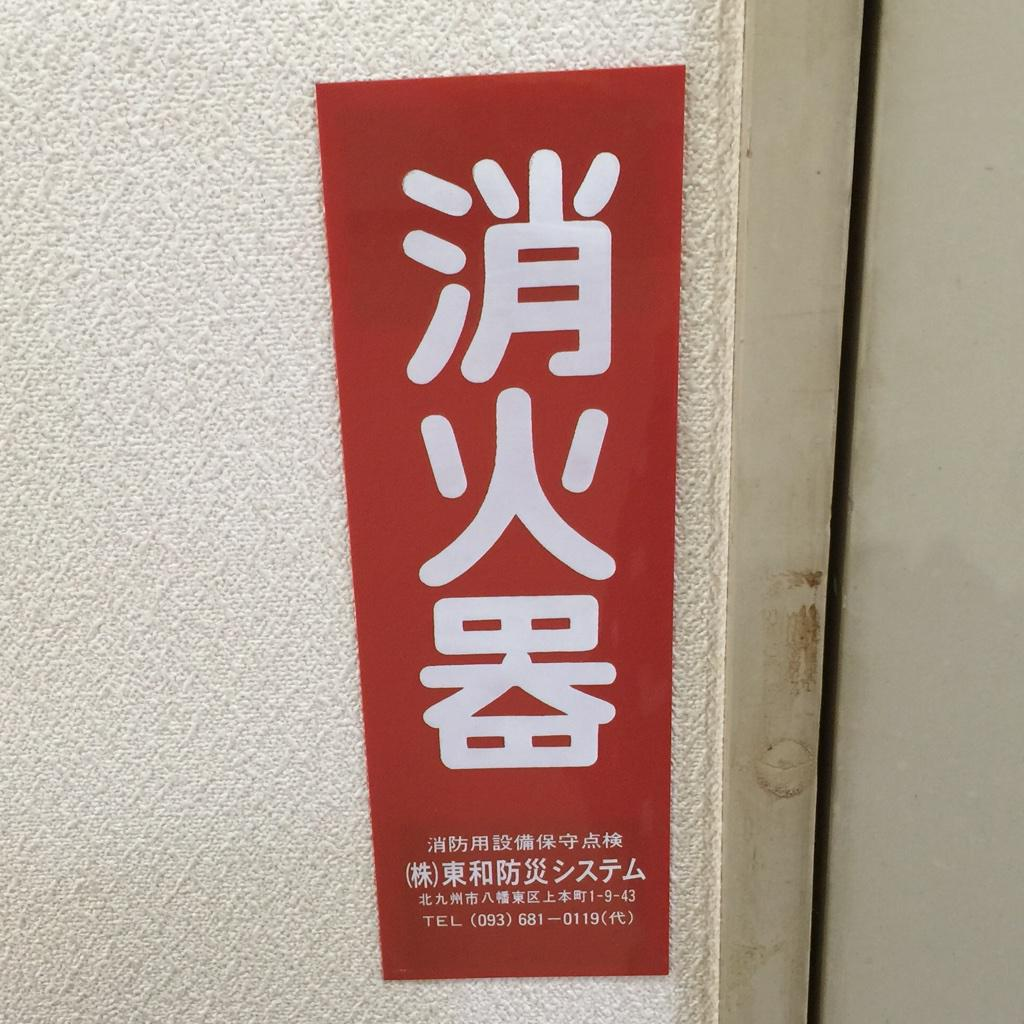 消火器の「器」が略字で書かれているパネル